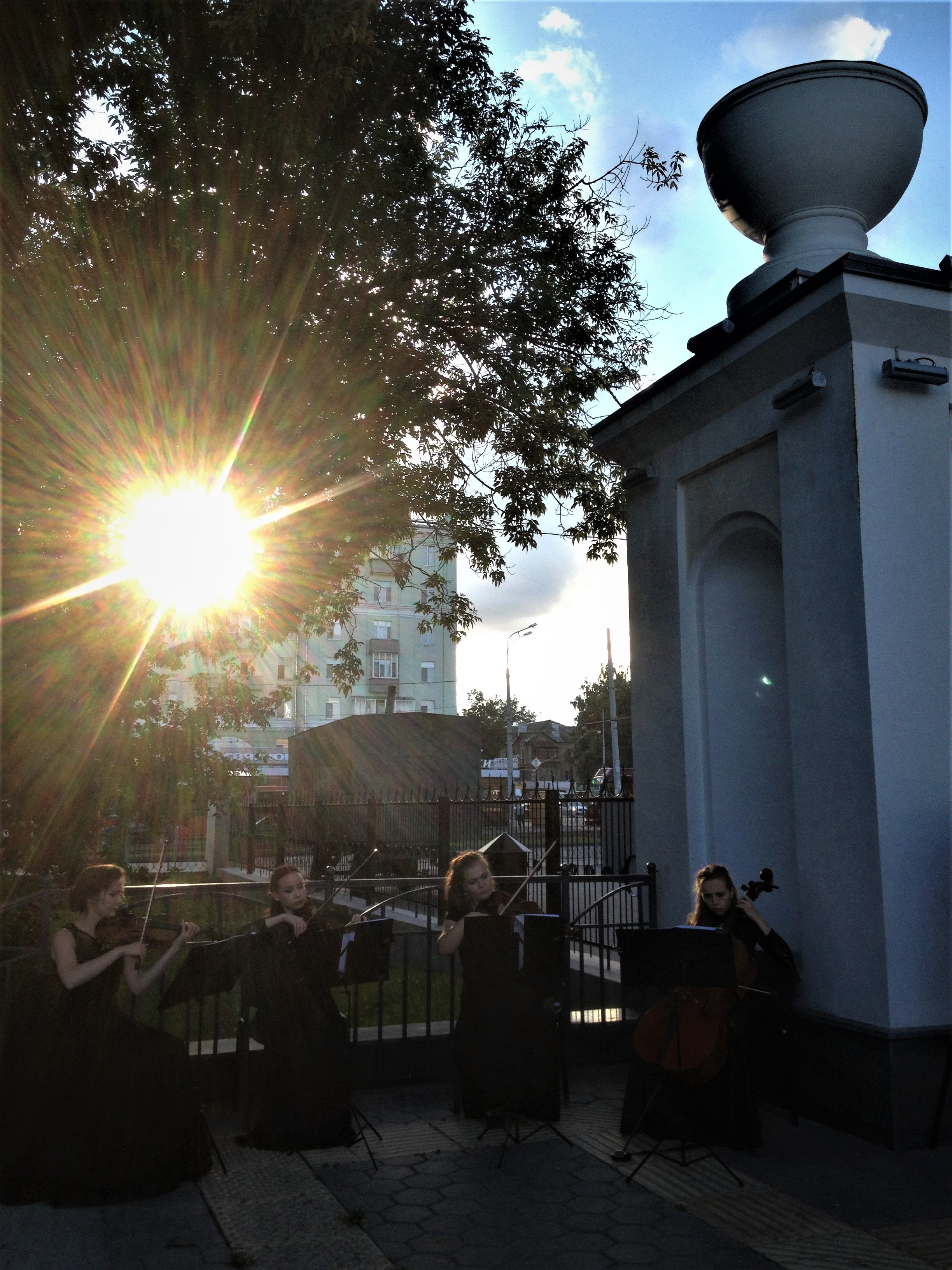 "Марафон классической музыки" в Парке "Крылья Советов" (Казань, 12 августа 2017 года).